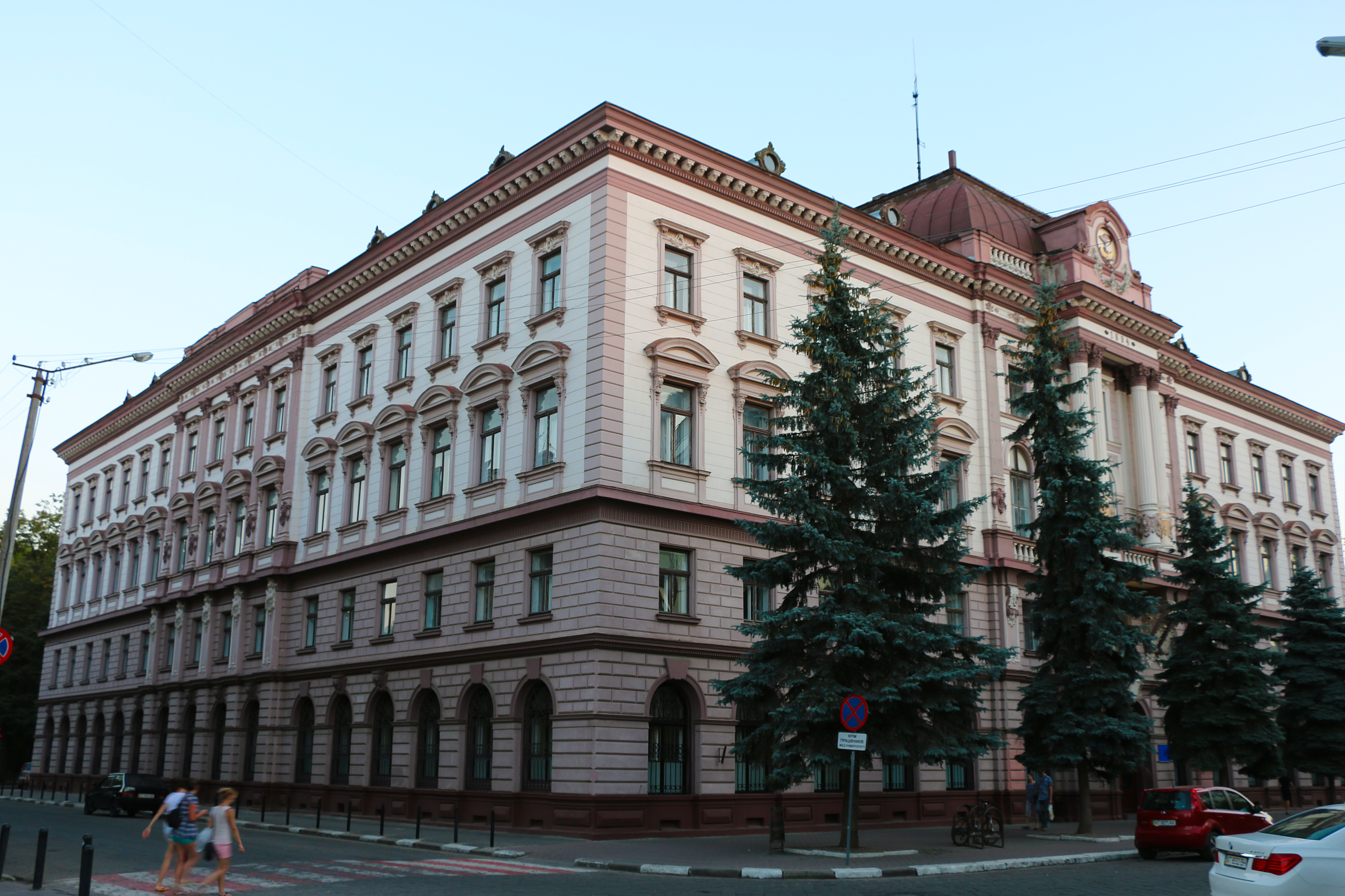 Австрійська дирекція залізниці, пізніше польський магістрат (мур.), Івано-Франківськ, вул. Галицька, 2